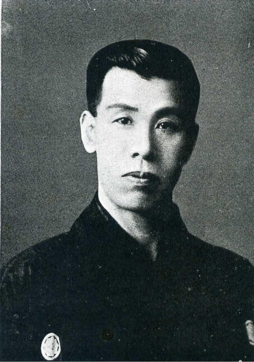 この写真は、保良浅之助（1883-1975）の写真です。